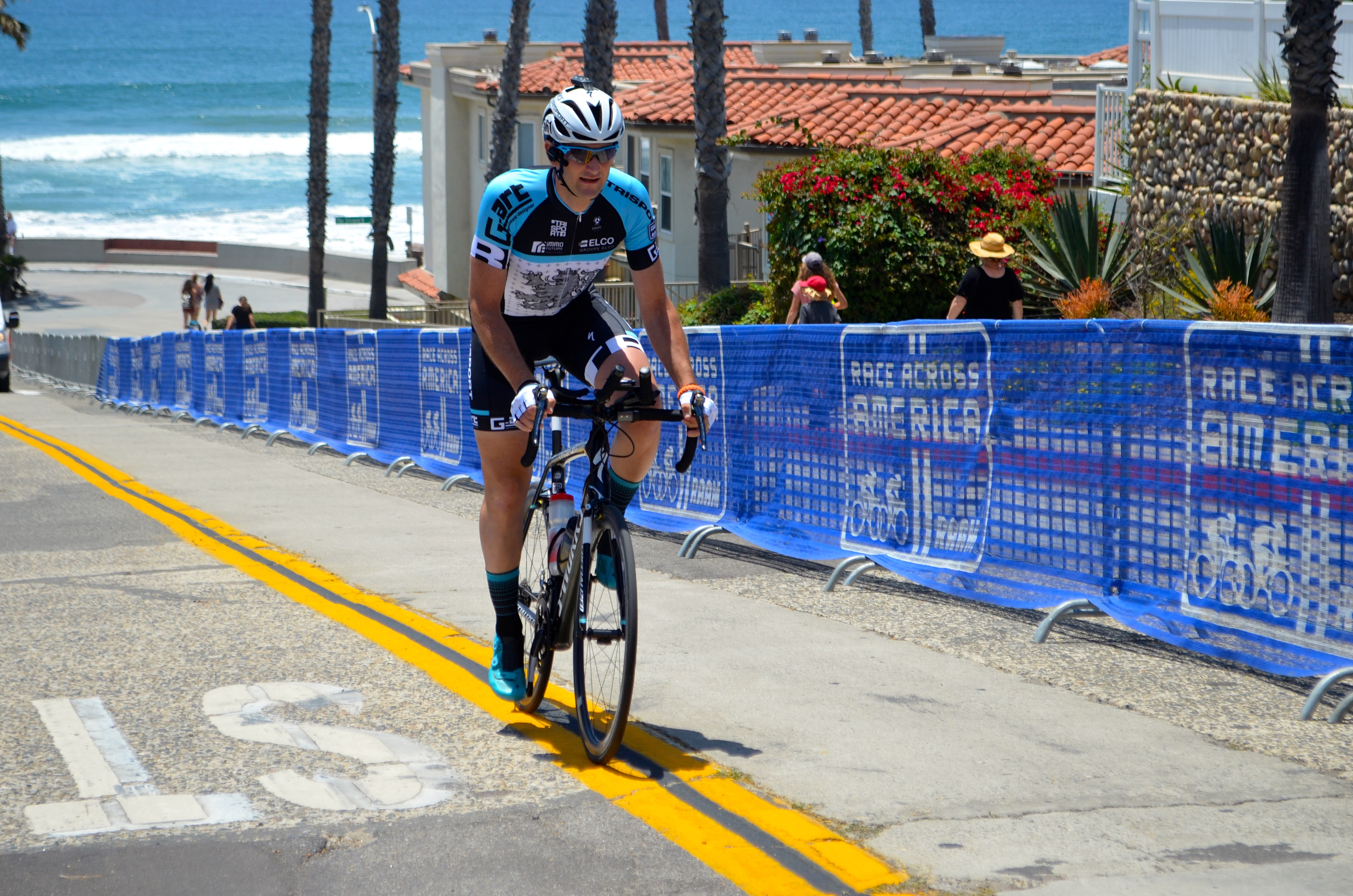 Ralph Diseviscourt - RAAM 2016